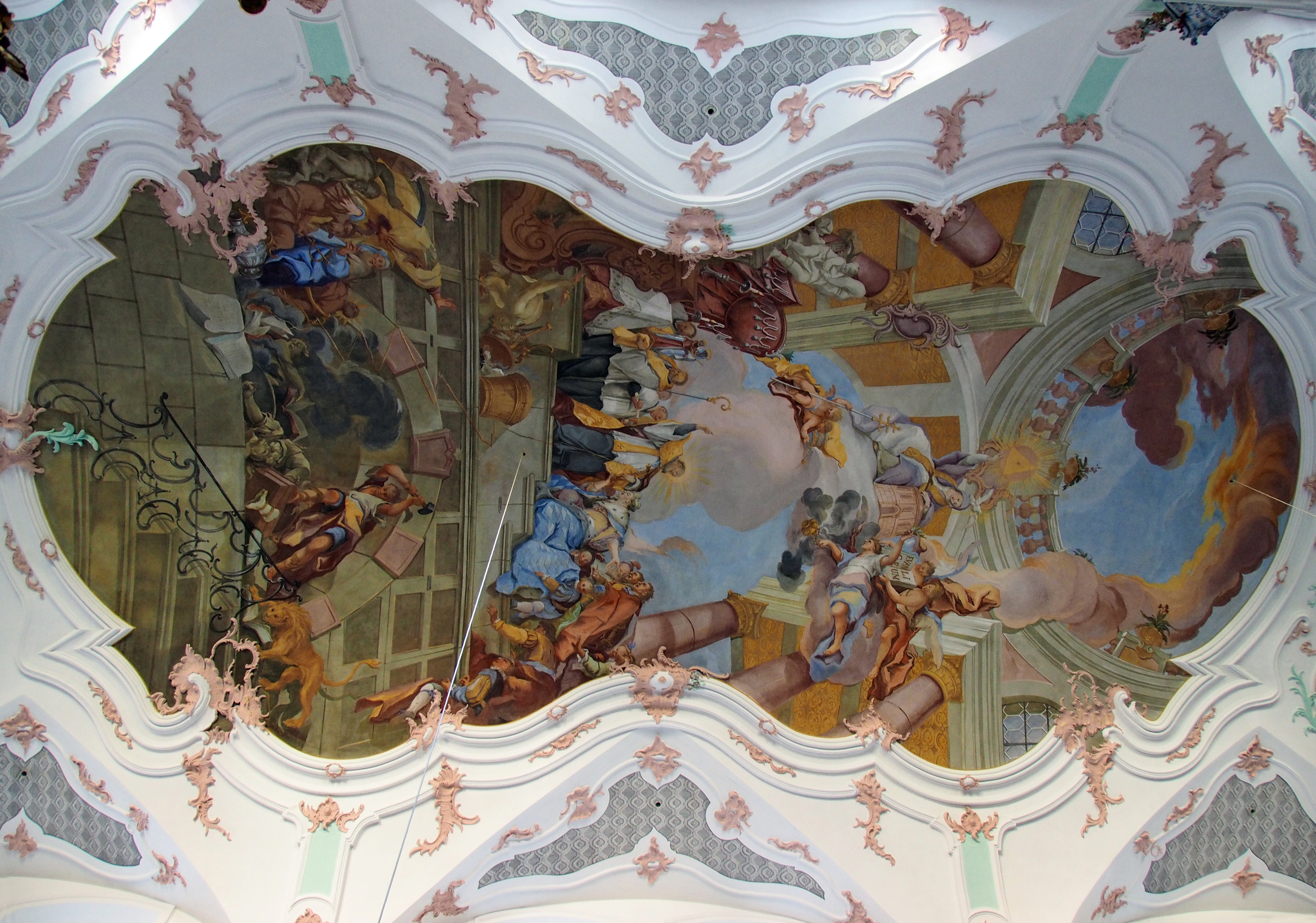 St. Rupert-Kirche, Deckenfresco, Emmeramsplatz, Regensburg (1765)